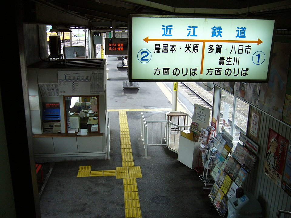 彦根駅 近江鉄道改札口